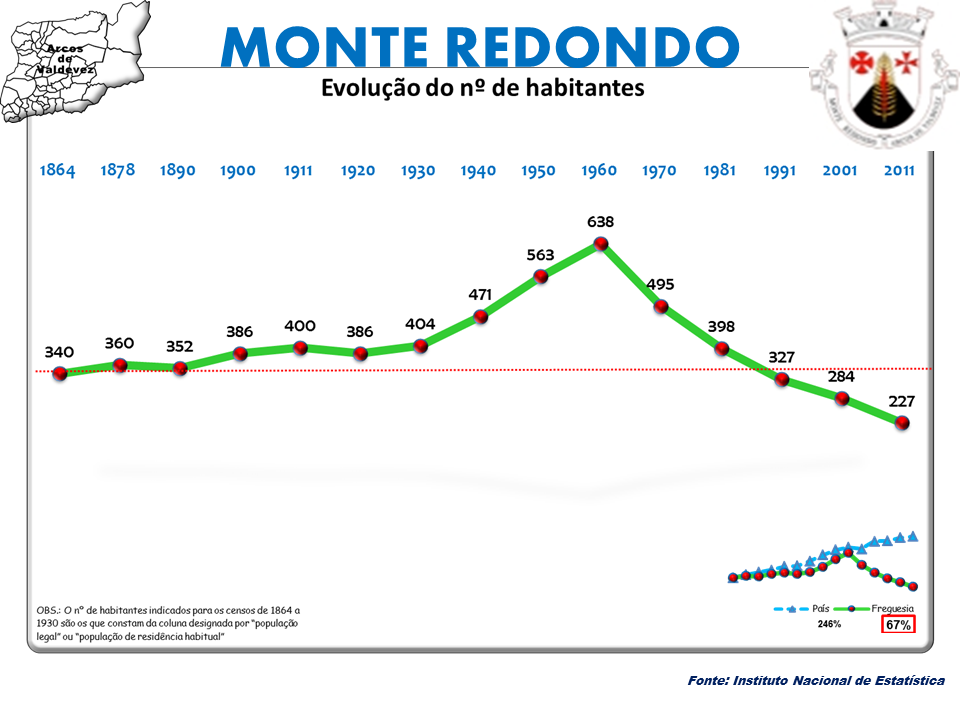 Censos 1864/2011